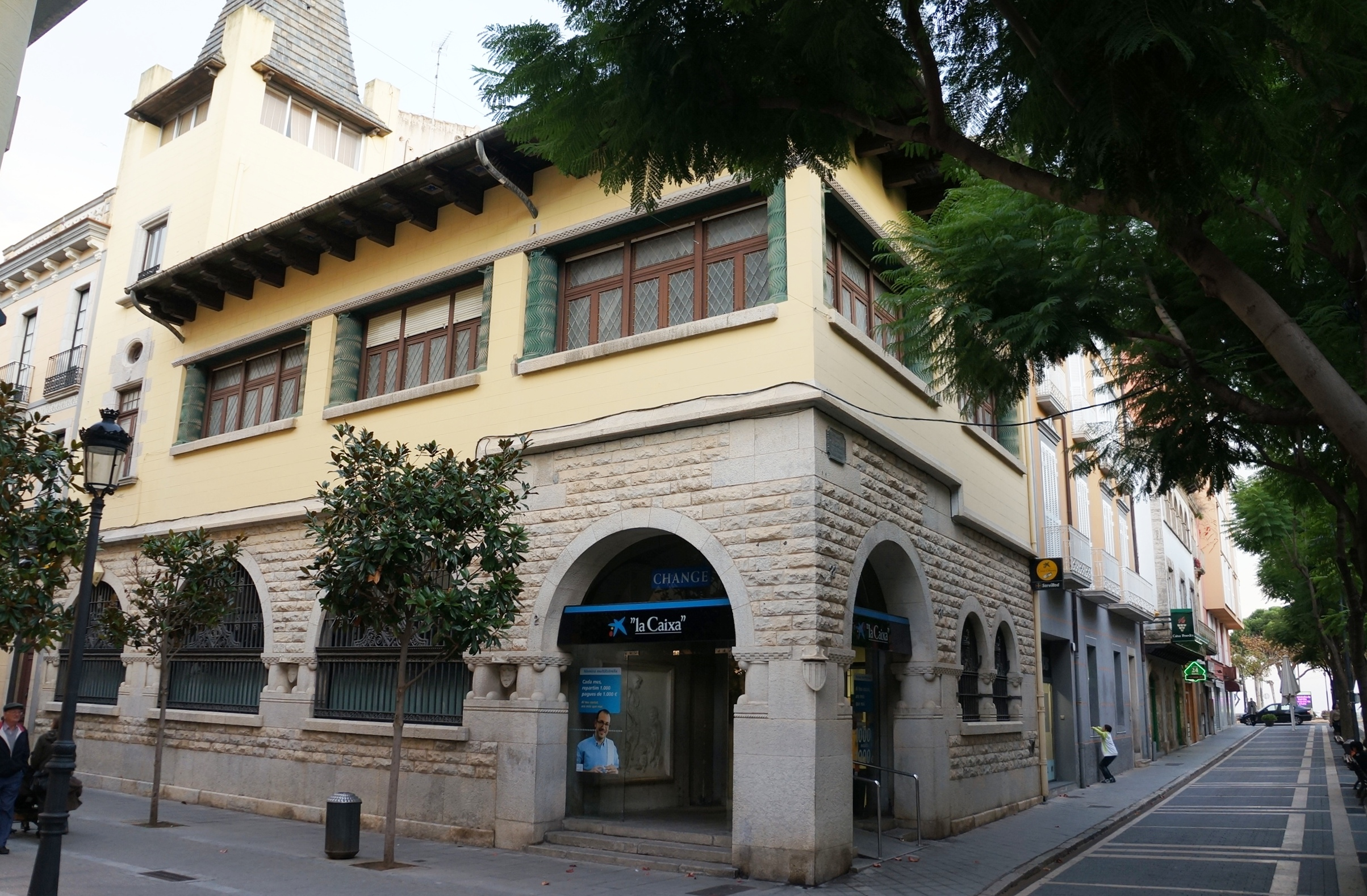 Caixa de Pensions per a la Vellesa i d'Estalvis